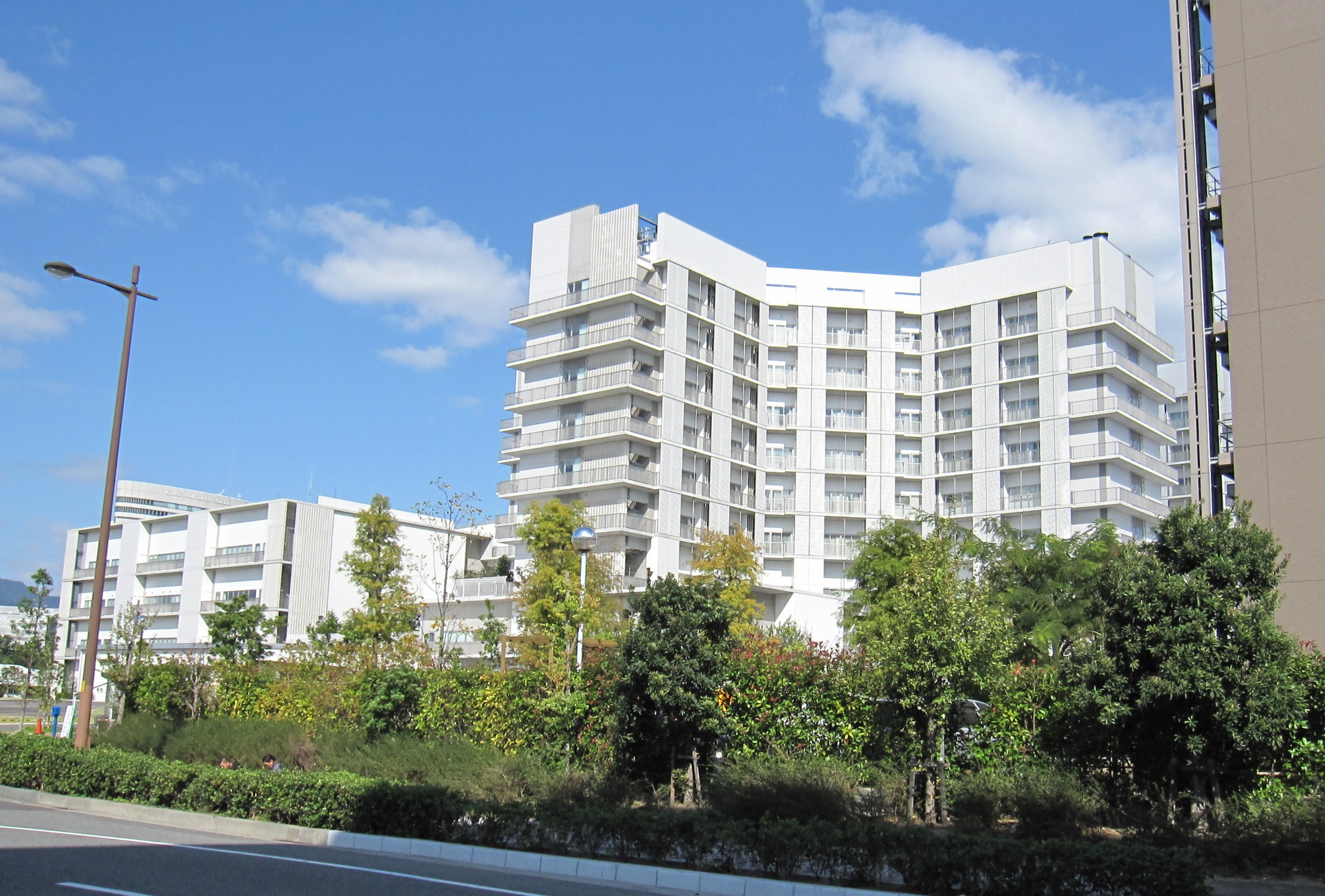 神戸市立医療センター中央市民病院新病院